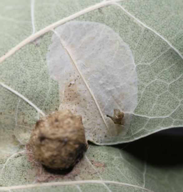 Mine von Phyllonorycter quercifoliella an Stieleichenblatt, Blattunterseite, Mitte September 2019; im unteren Bereich der Mine ragt eine geöffnete Puppe heraus; links unten im Bild eine Galle